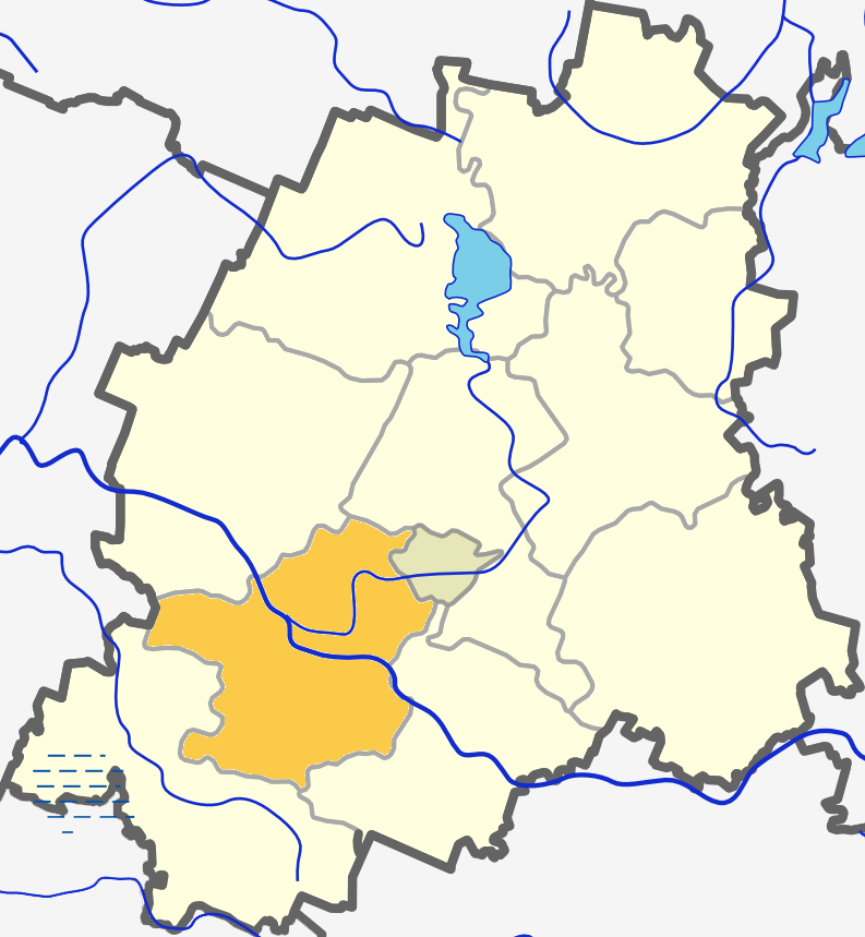 Расположение Наусодского староства на карте Плунгеского района